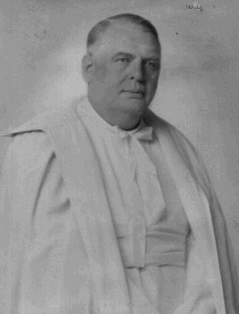 Romuald Rudolf Perlík (1882 - 1947), Premonstrát, archivář na Strahově a pedagog.